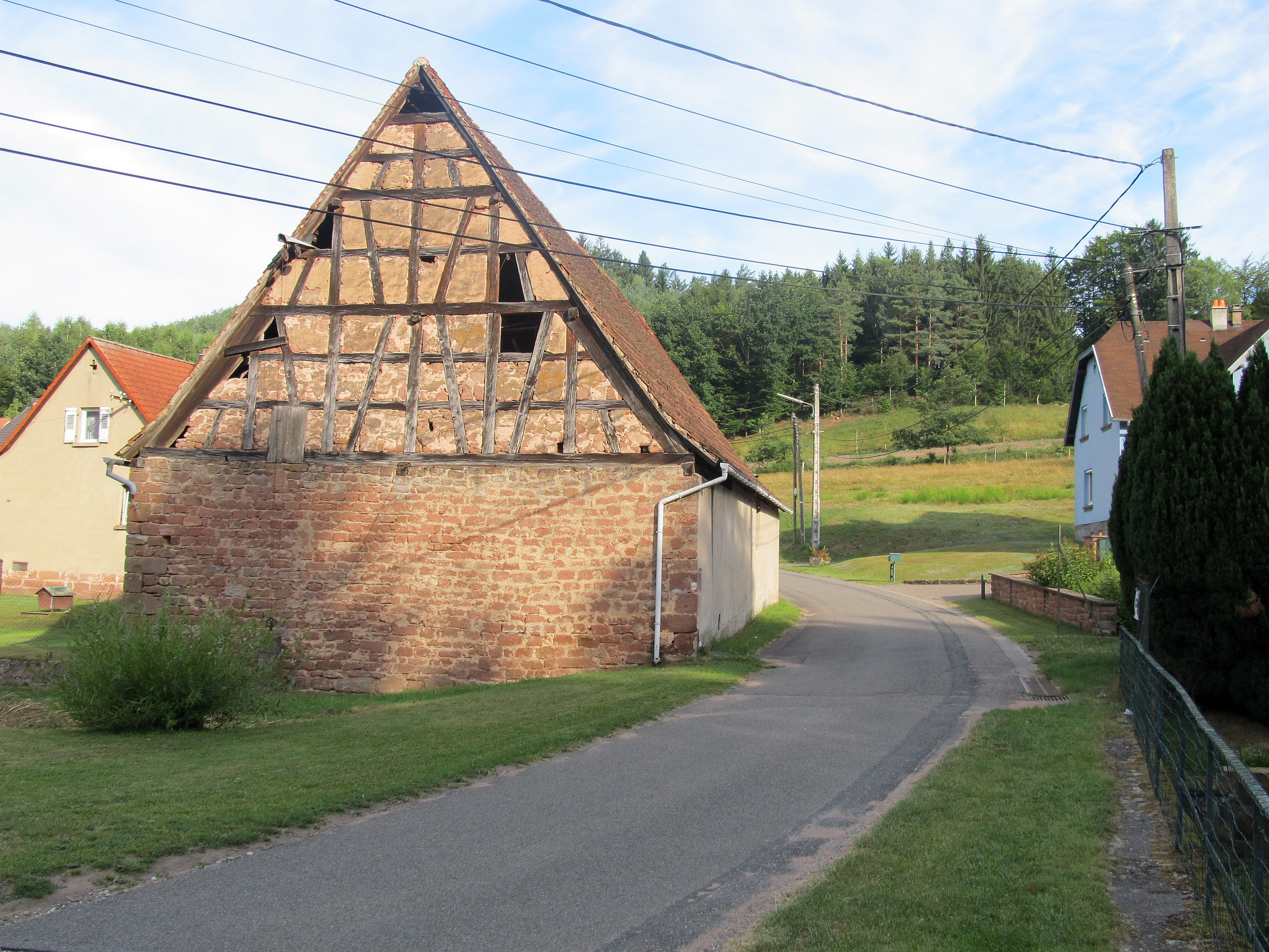 Baerenthal: l'hameau de Fisherhof